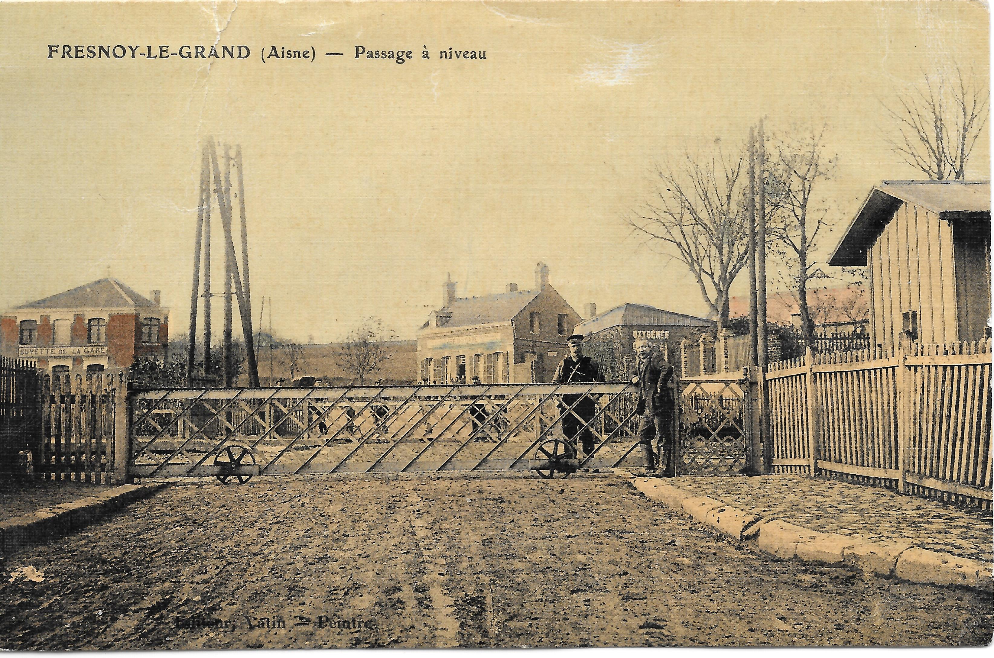 Carte postale